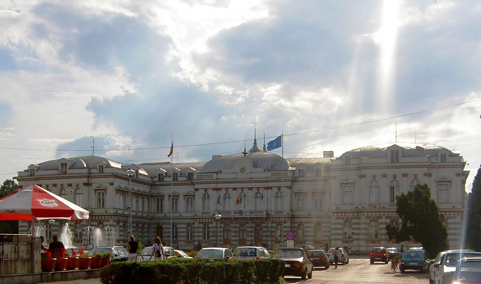 PREFECTURA BACAU Cladire construita in 1891